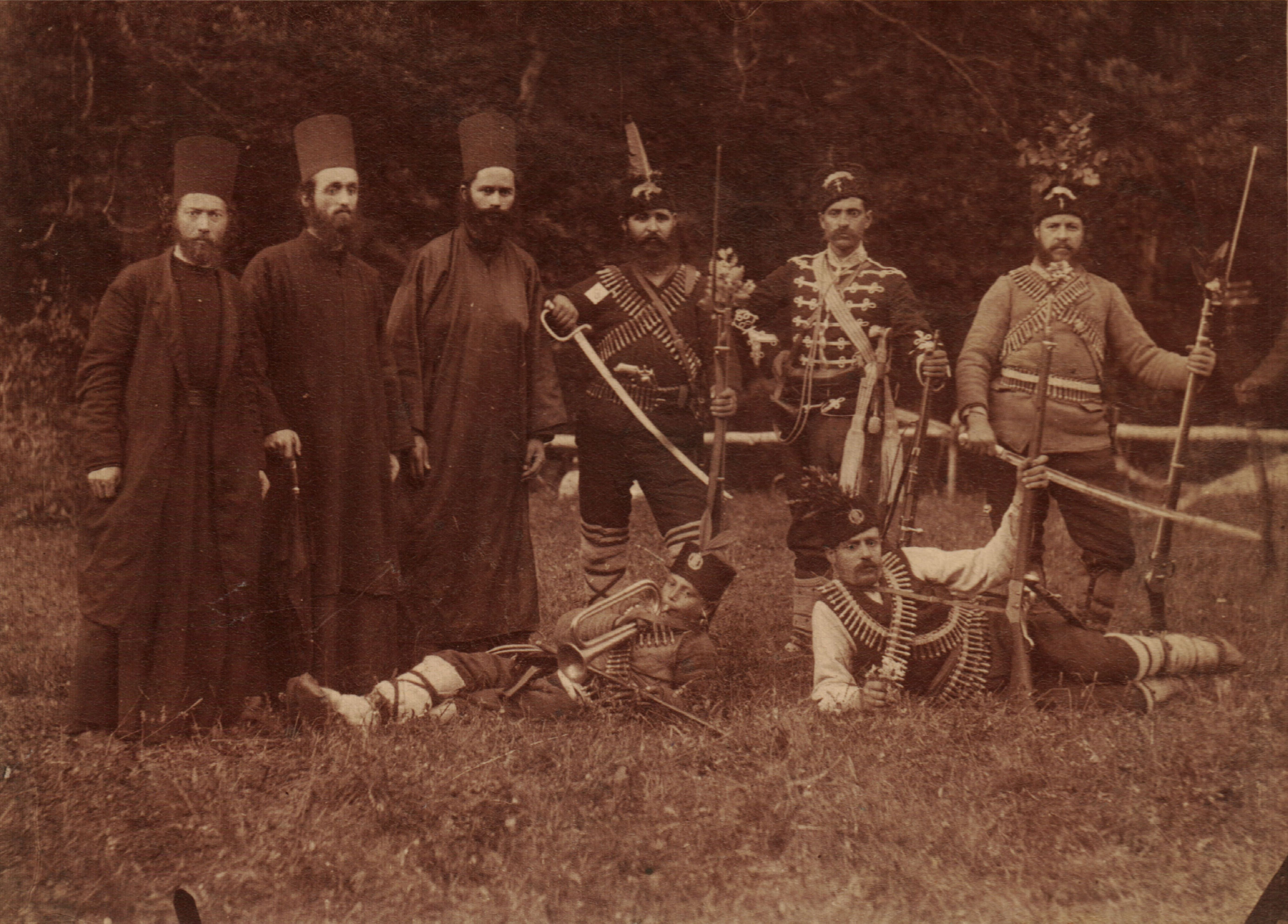 Снимка на четата на Стою Войвода.